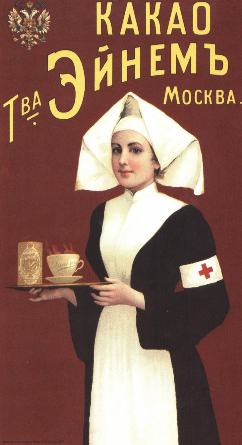 Товарищество "Эйнем". Реклама какао. До 1917 года.